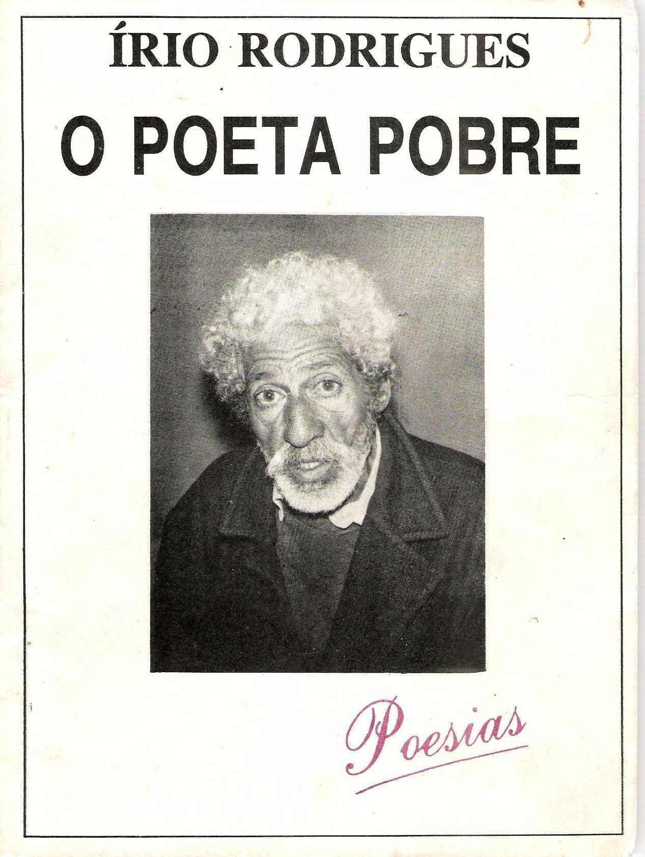 Capa do primeiro livro de Írio Rodrigues